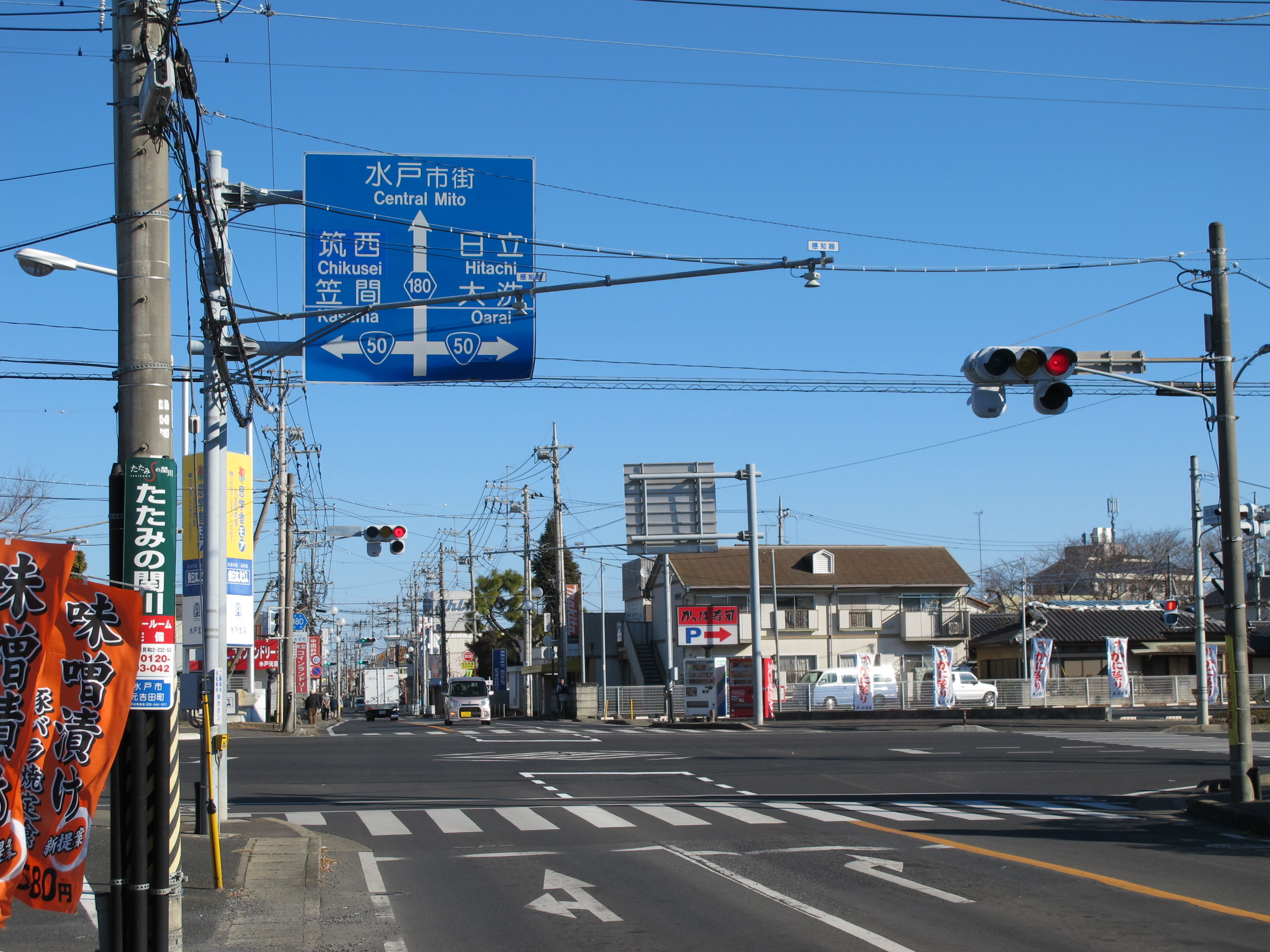 茨城県道180号長岡水戸線（国道50号との交点）